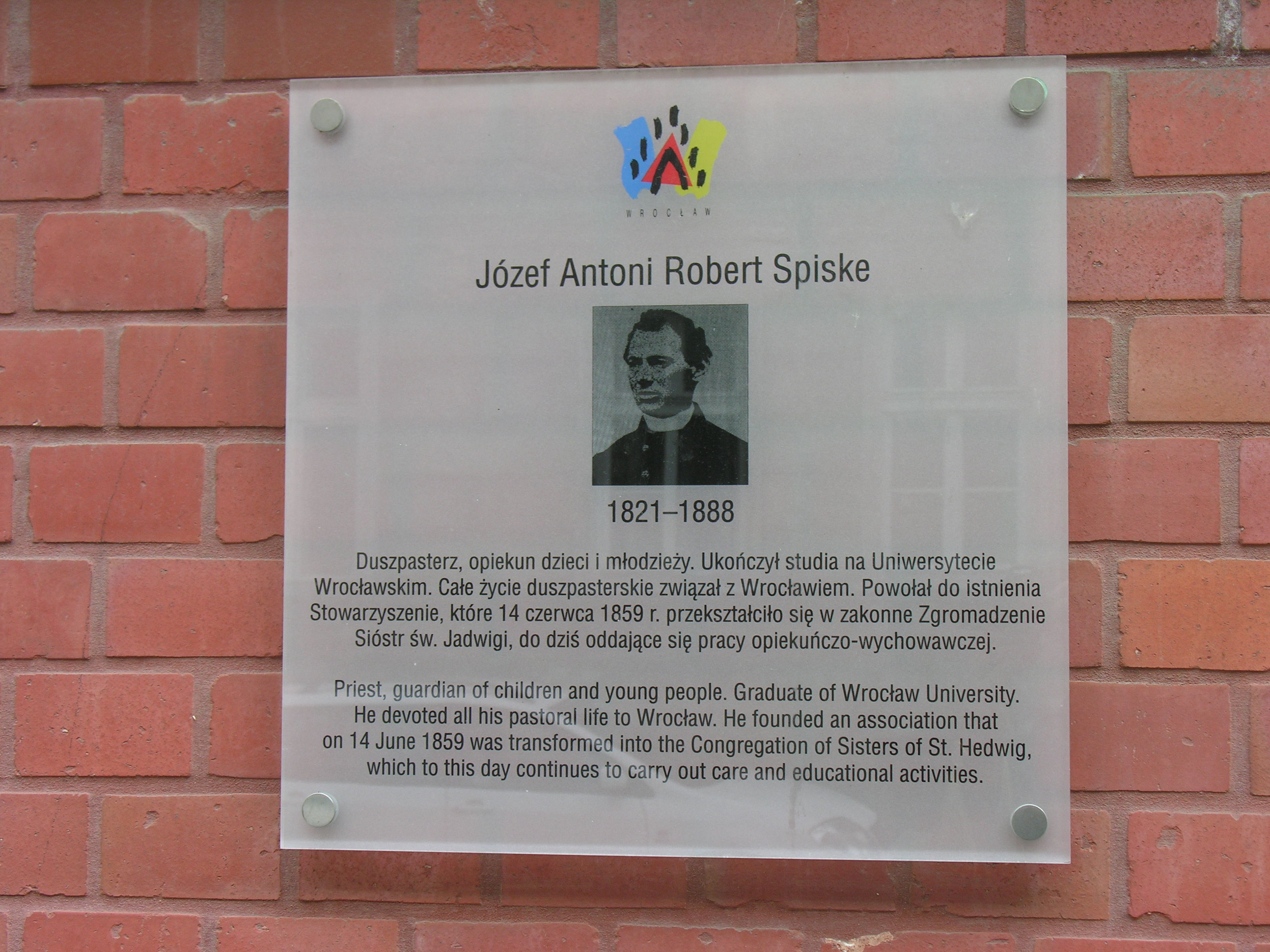 Tablica ku czci księdza Roberta Spiske przy ul. Sępa-Szarzyńskiego 29 we Wrocławiu